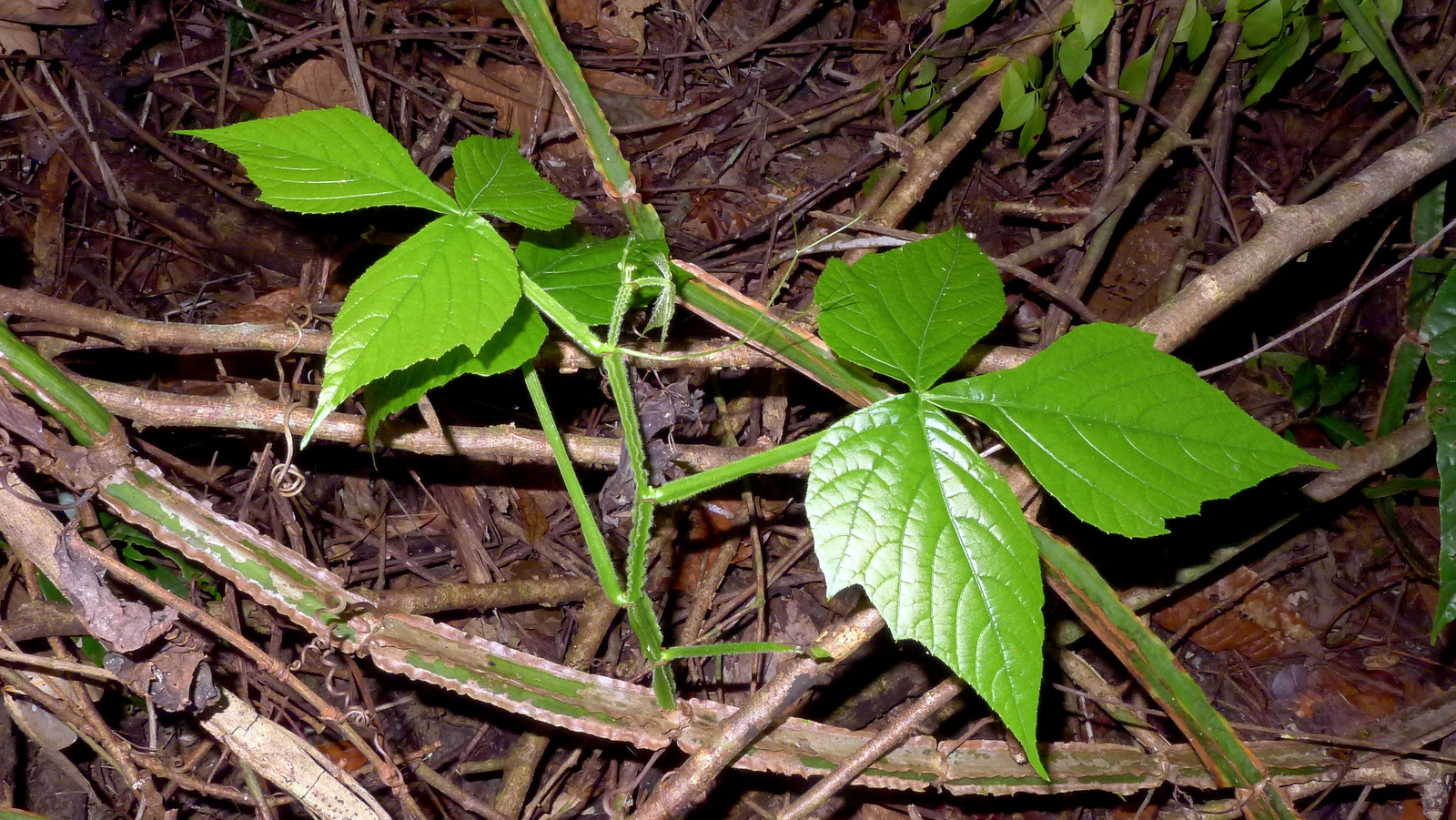 Cissus trigona Schult. & Schult.f.